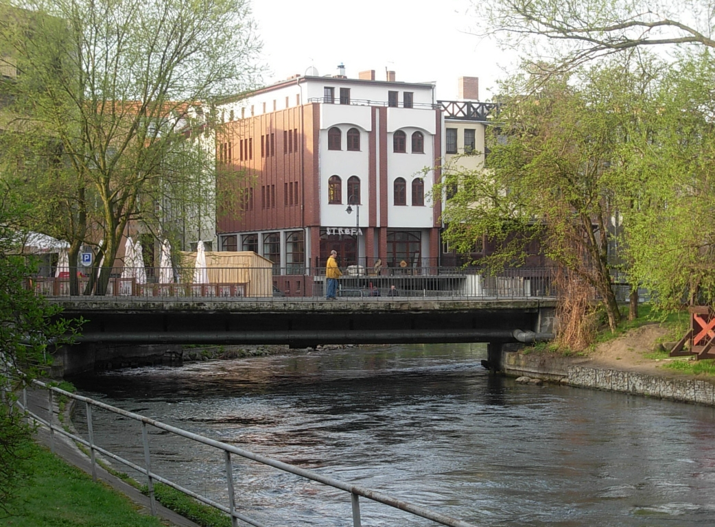 Most Młyński w Bydgoszczy